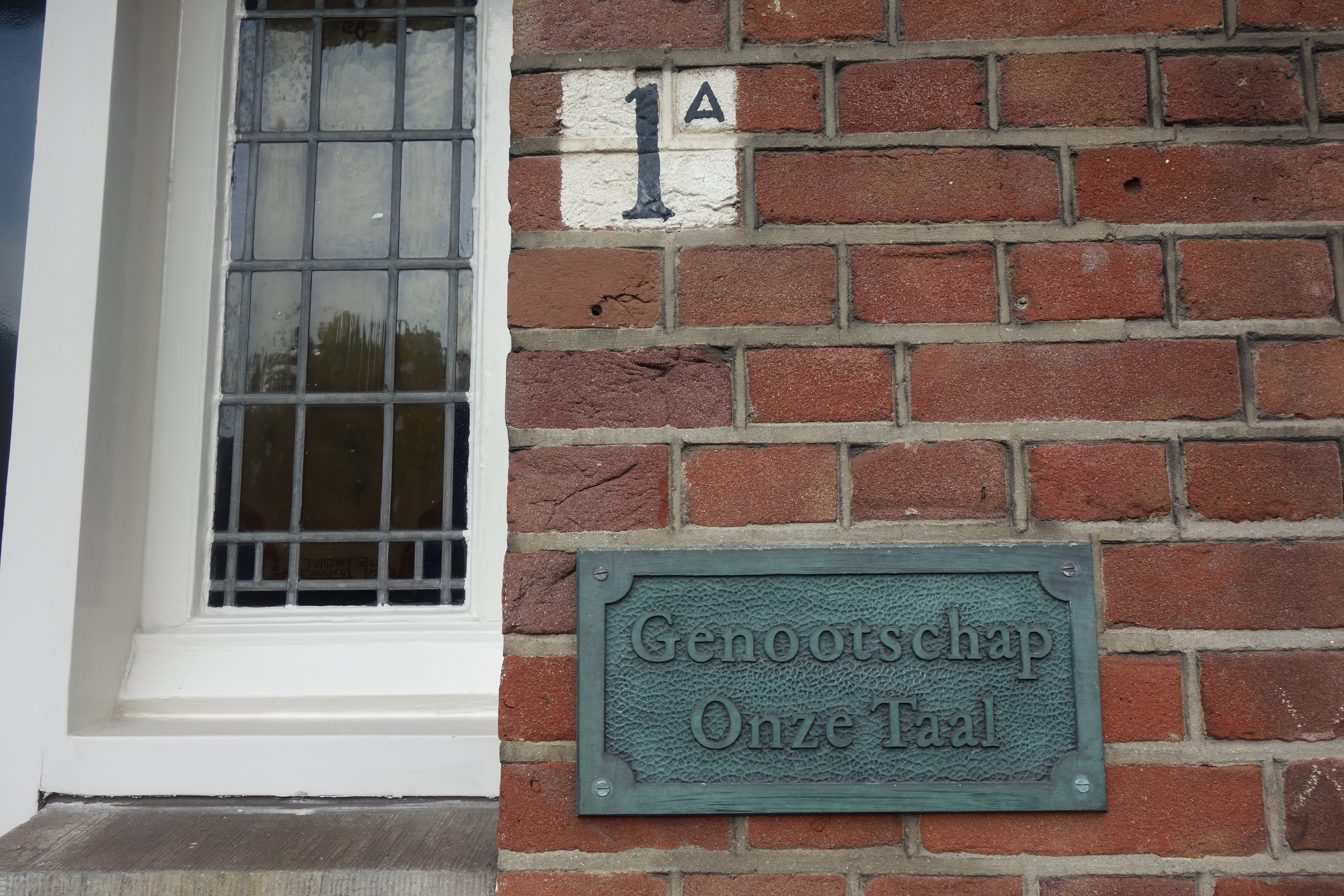 Genootschap Onze Taal, Raamweg 1a, Den Haag (Nederland)